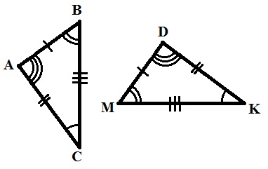 1. zīm. △ A B C = △ D M K {\textstyle \vartriangle ABC=\vartriangle DMK} un tas nozīmē, ka trijstūri ABC un DMK ir vienādi.